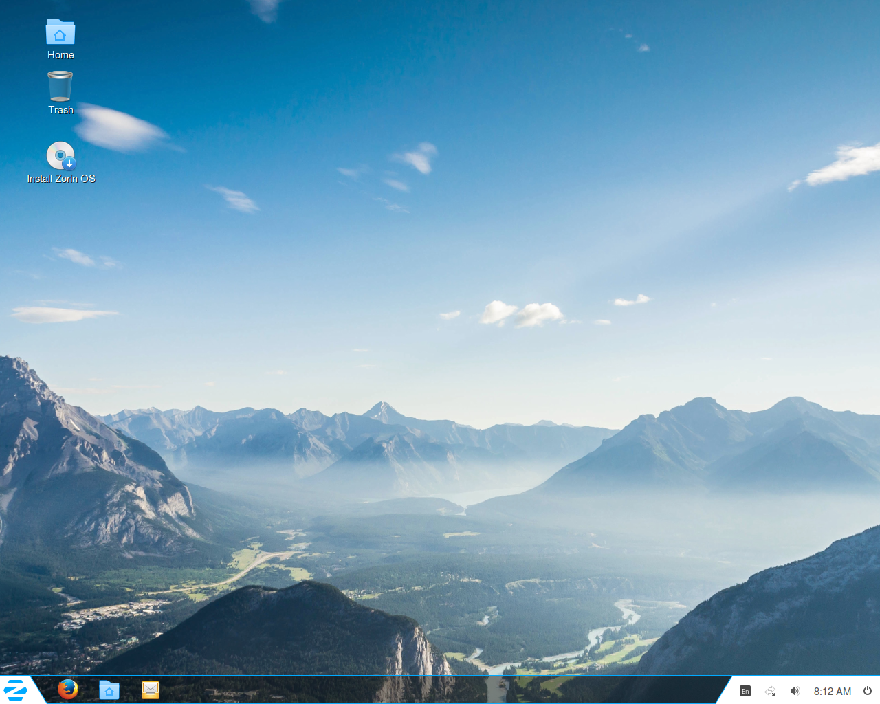 Zorin OS 11